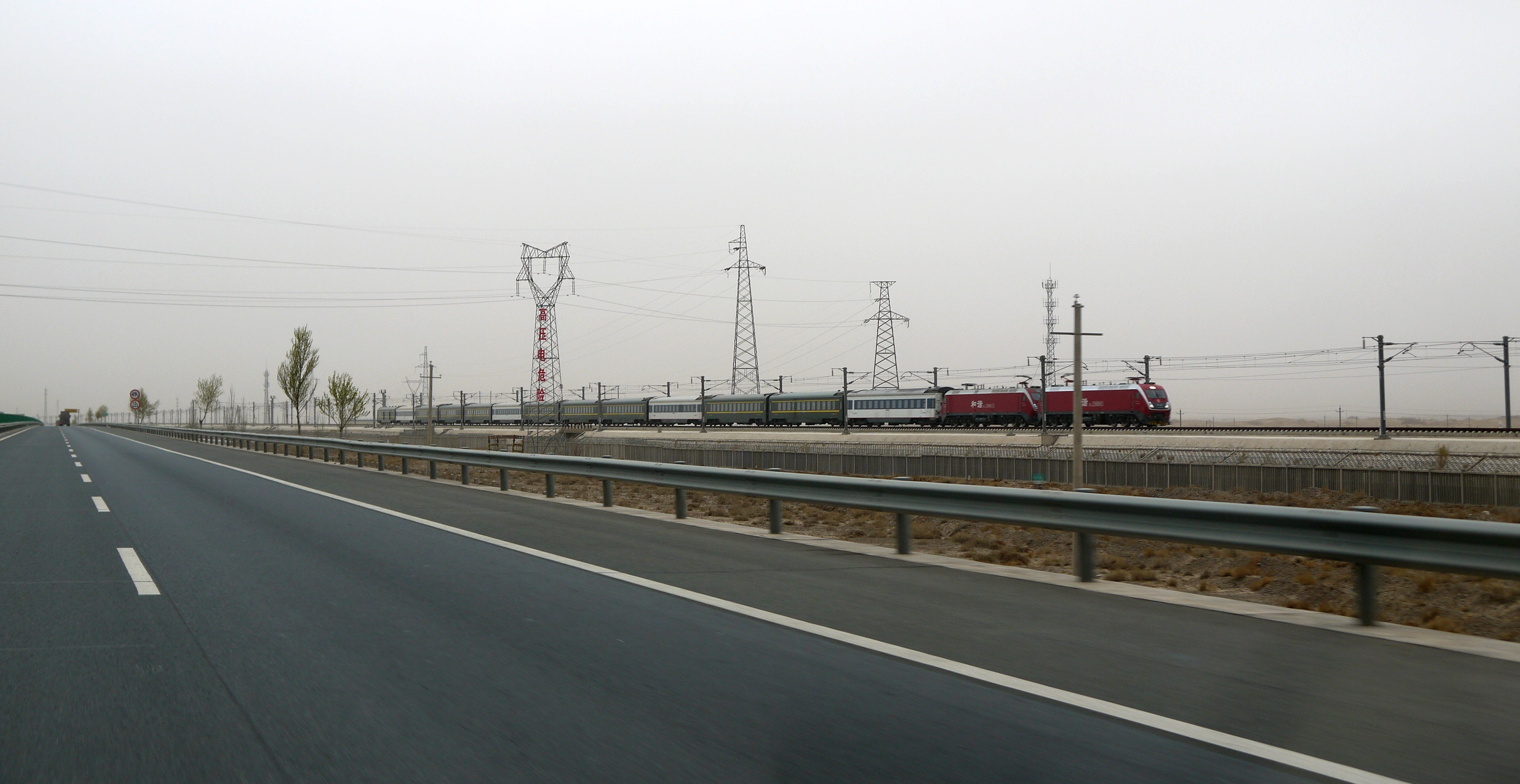 連霍高速